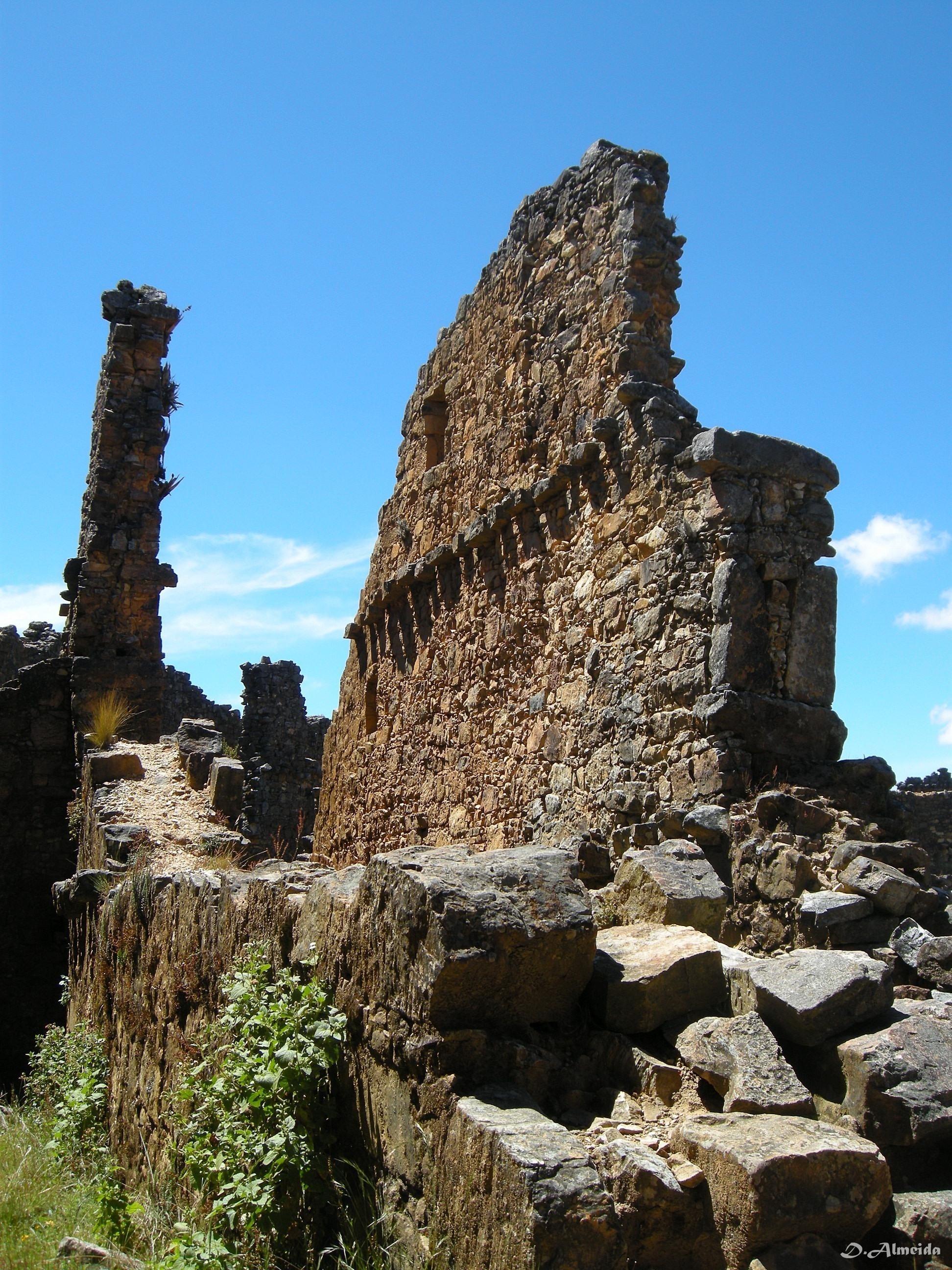 Marcahuamachuco: Doble muralla en galería circular de Las Monjas